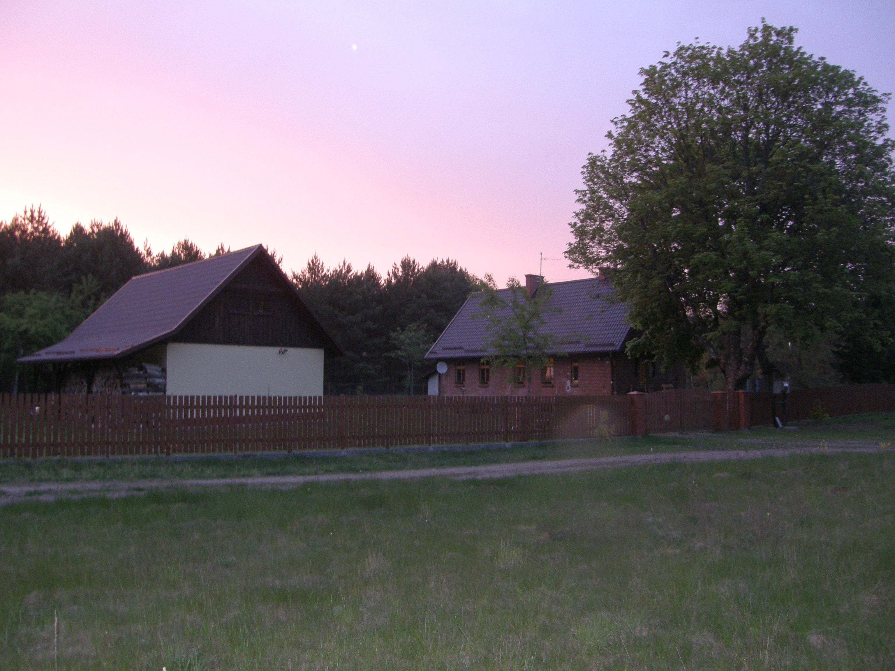 zachód słońca w Grzybnie